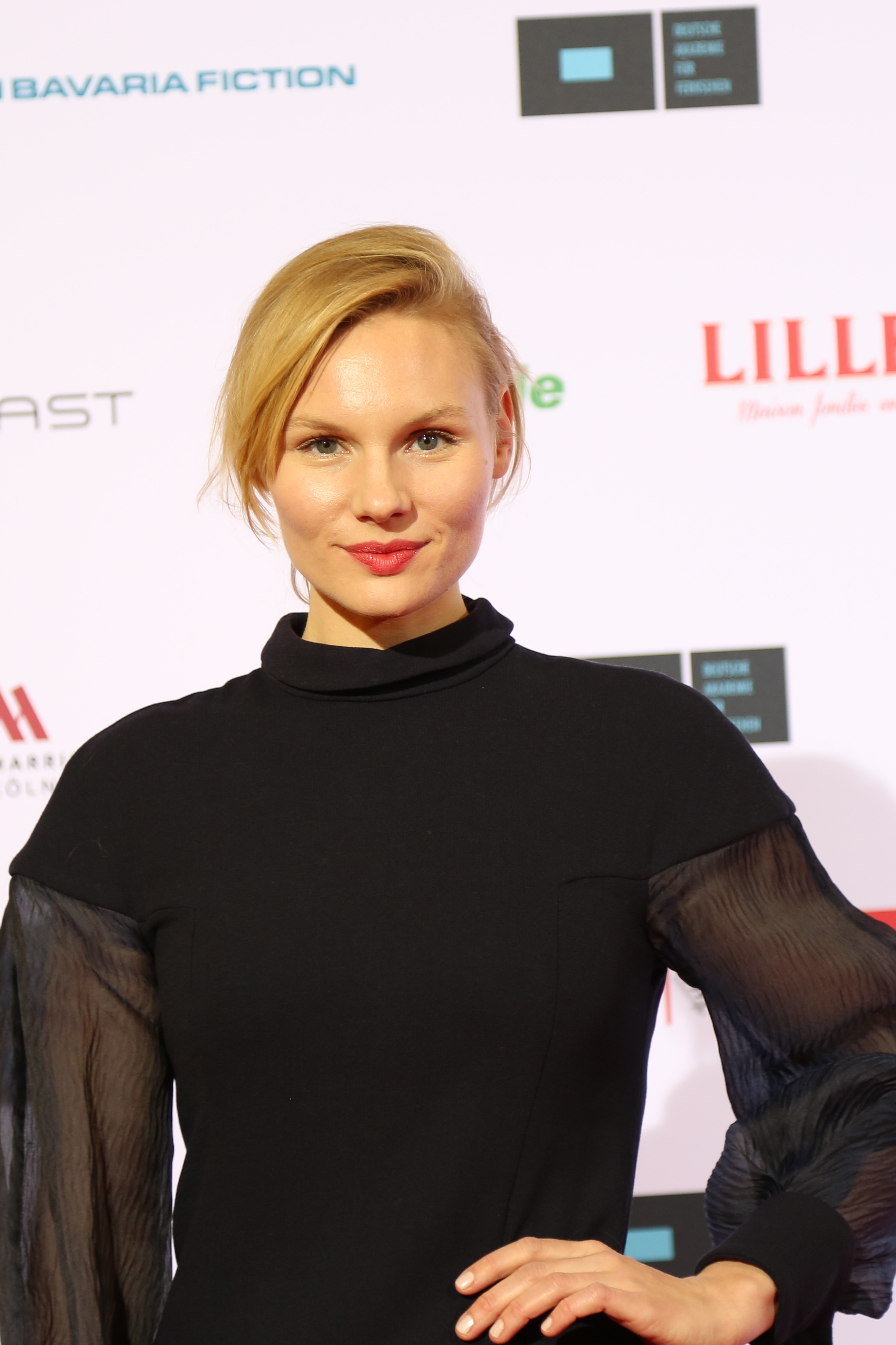 Rosalie Thomass bei der Verleihung der Auszeichnungen der Deutschen Akademie für Fernsehen (DAFF) 2017.